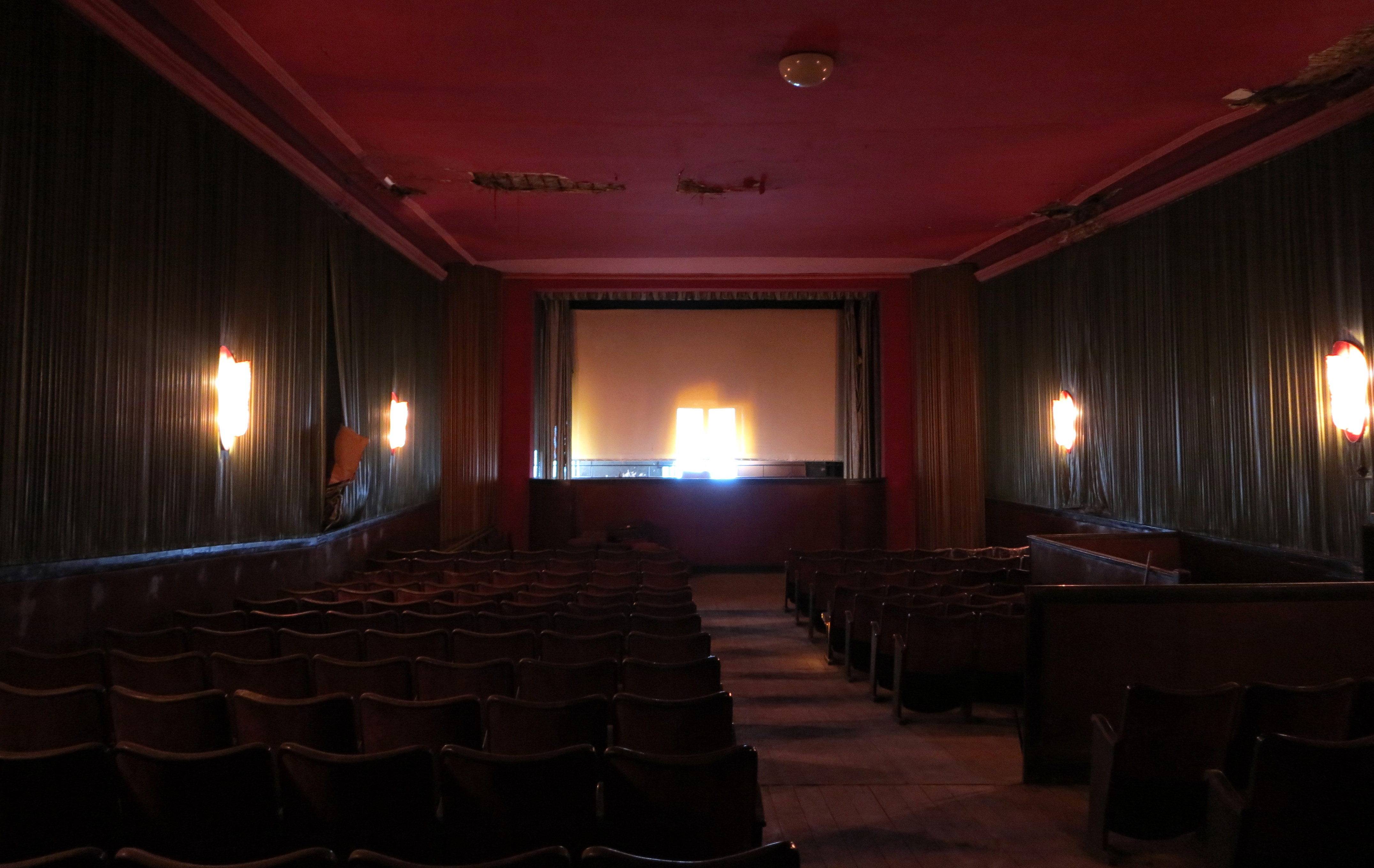 Kinosaal des bis 1985 betriebenen Kinos Eden-Lichtspiele in Lübeck im denkmalgeschützten Gebäude Königstraße 25 am Tag des Offenen Denkmals 2013